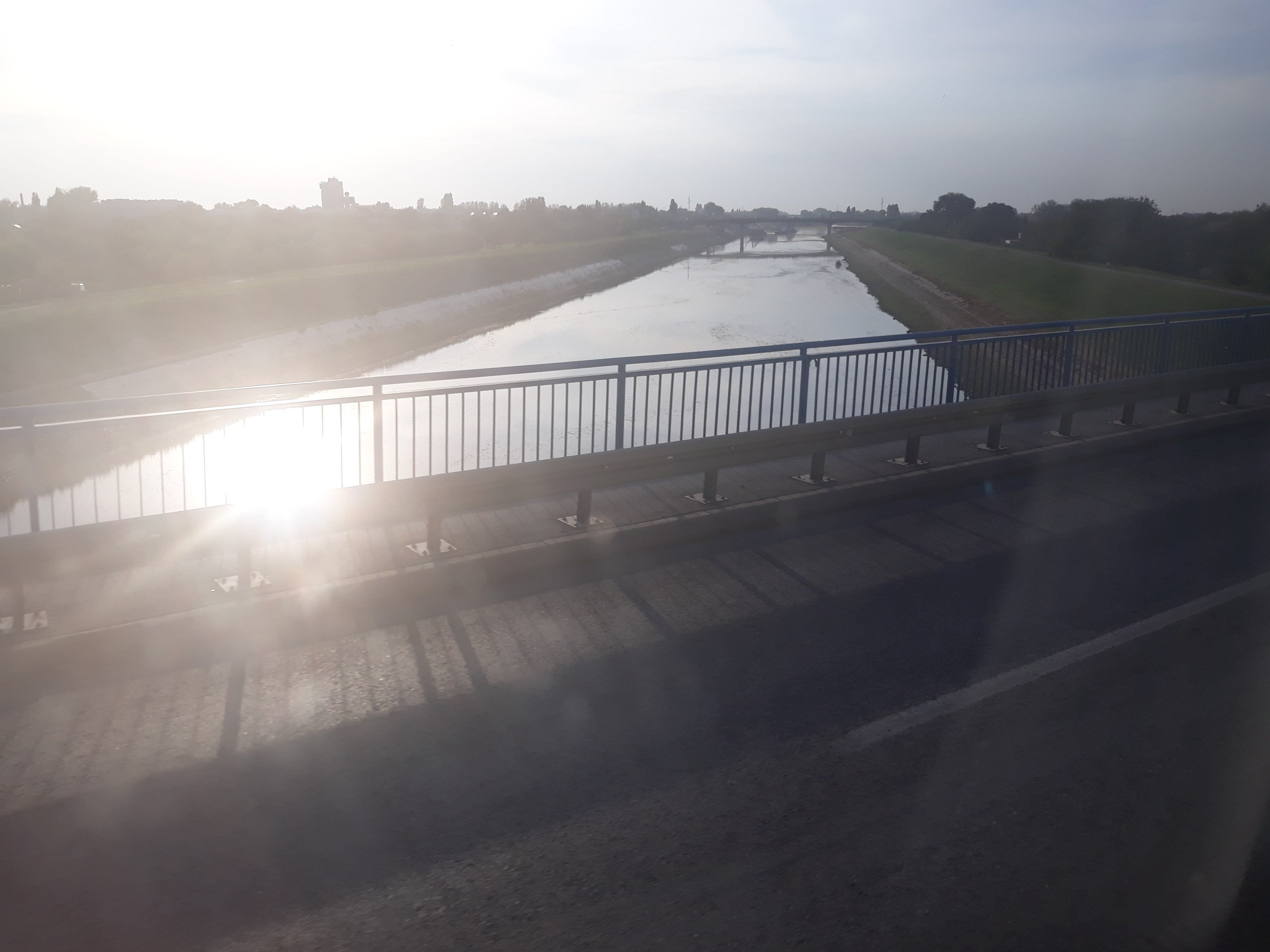 Поглед на канал Дунав—Тиса—Дунав са Темеринског моста.